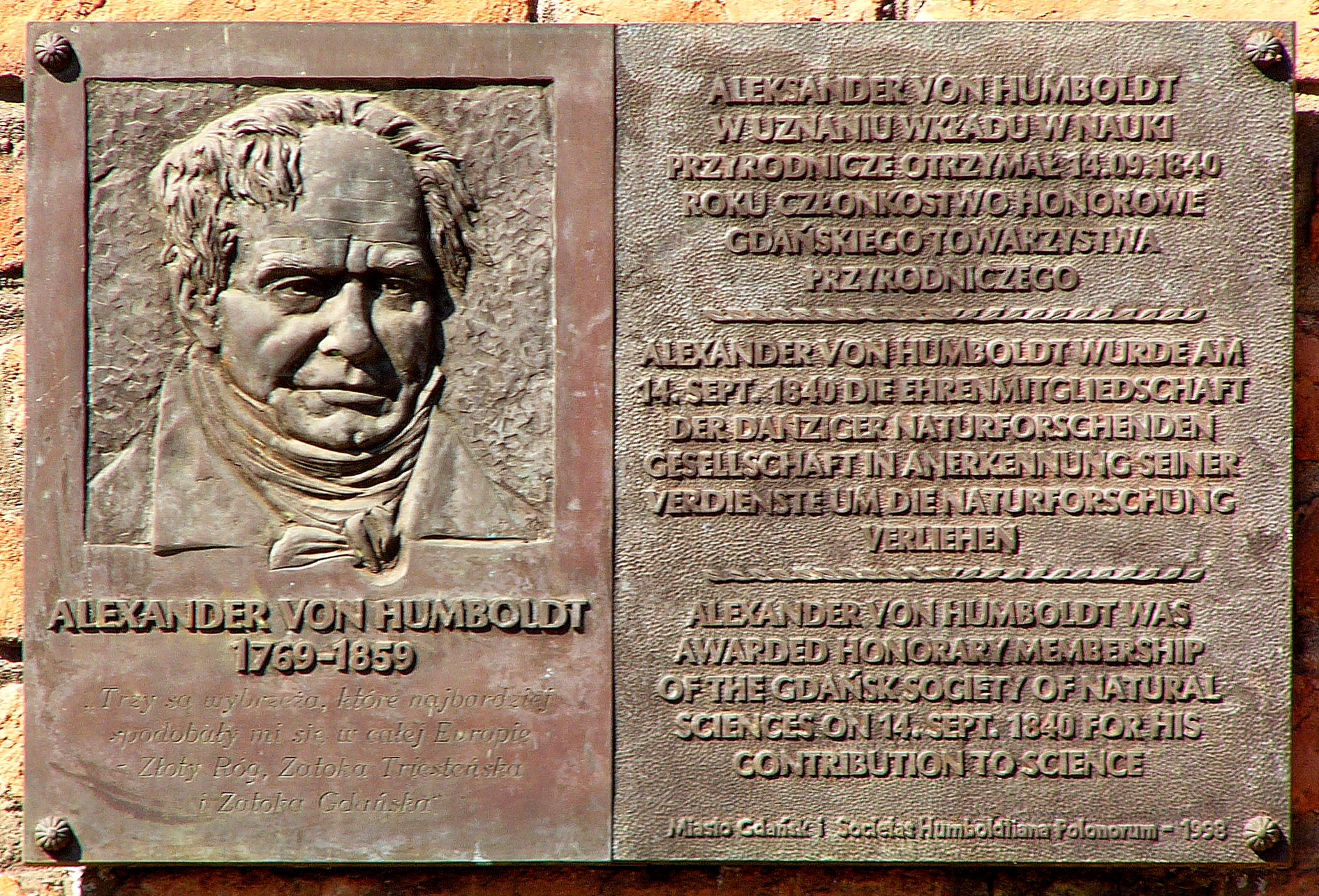 Erinnerungstafel an Alexander von Humboldt in der Danziger Altstadt.